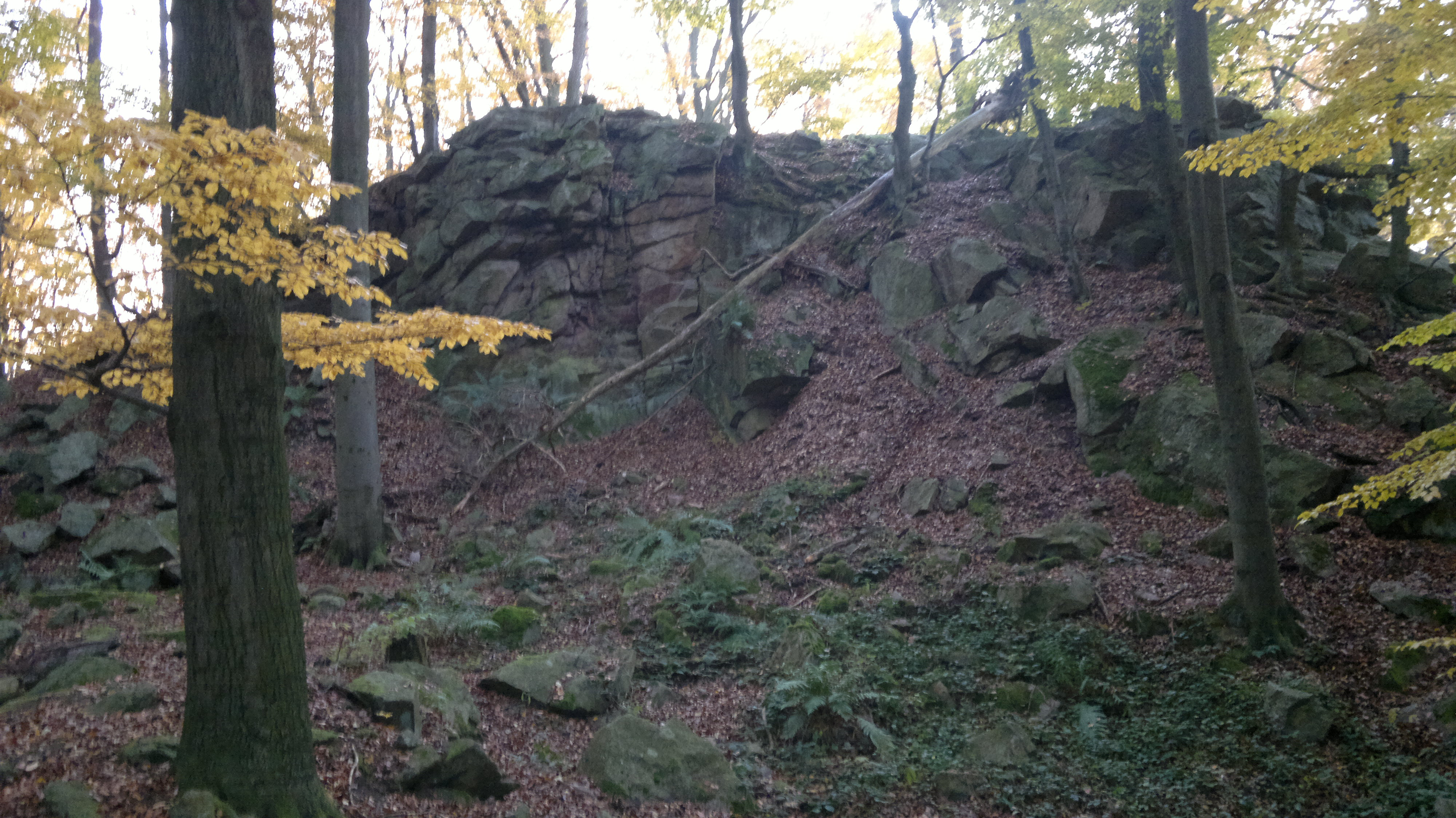 Mrazový srub vzniklý zvětráváním ortoruly